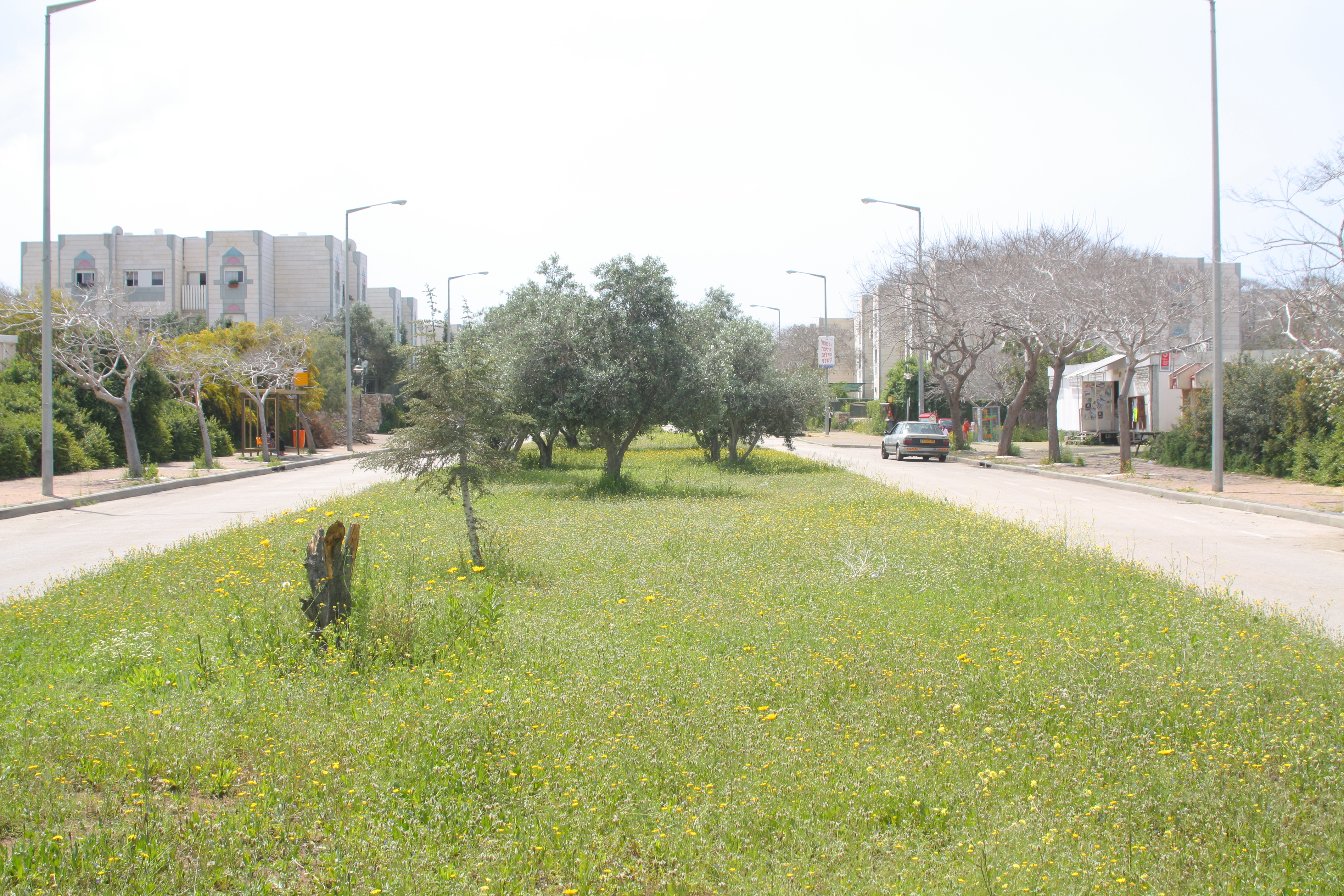 חריש Harish